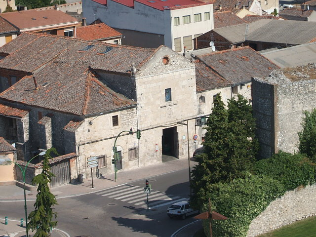 Vista del convento de San Basilio desde la torre del homenaje del castillo de Cuéllar